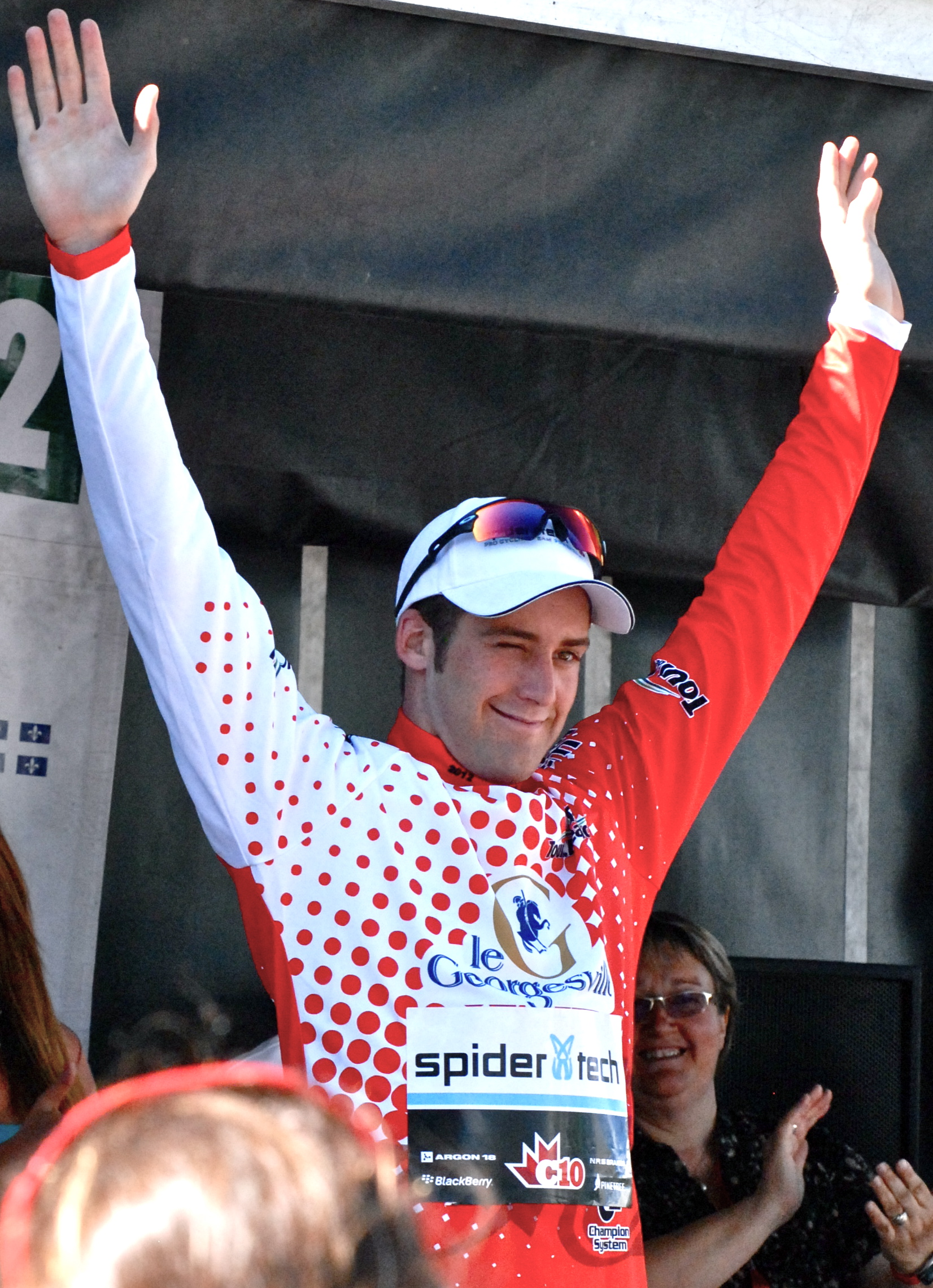 Hugo Houle, à la fin de la cinquième et avant-dernière étape du Tour de Beauce 2012, disputée le 16 juin 2012 à Québec, alors qu'il conserve le maillot rouge, attribué au meilleur jeune. Le lendemain, à la fin de la dernière étape, il termine deuxième au classement général du Tour de Beauce 2012.